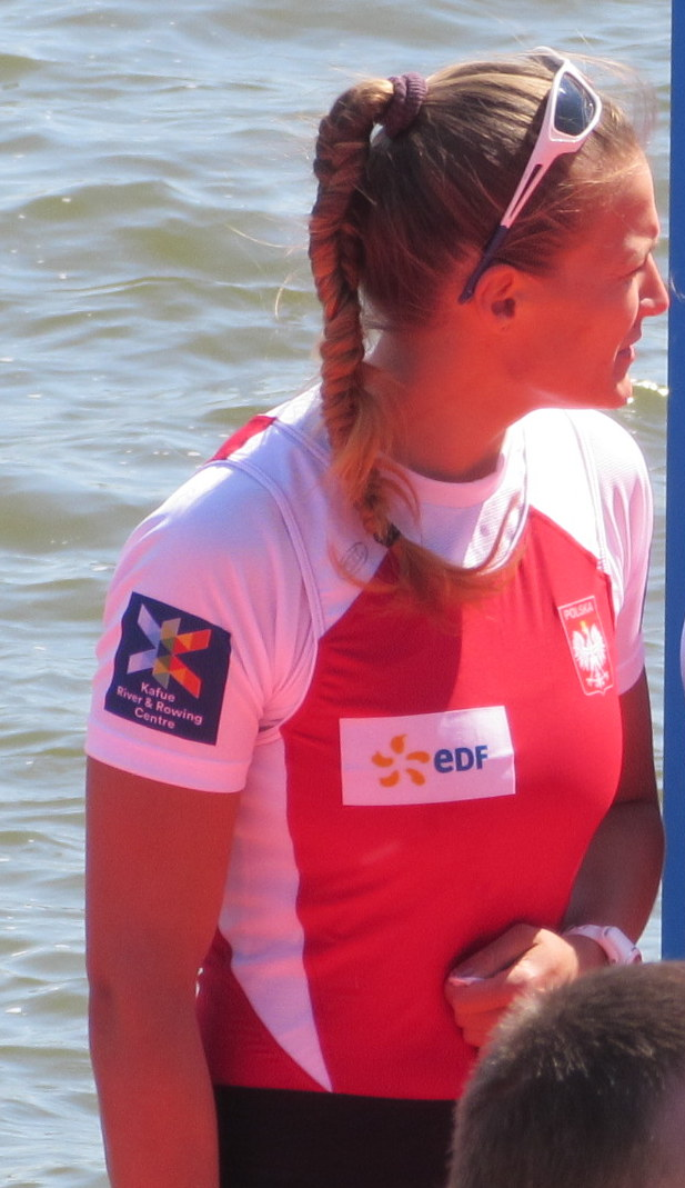 Monika Ciaciuch, Maria Springwald, Joanna Leszczyńska, Agnieszka Kobus, Ruder-EM 2016